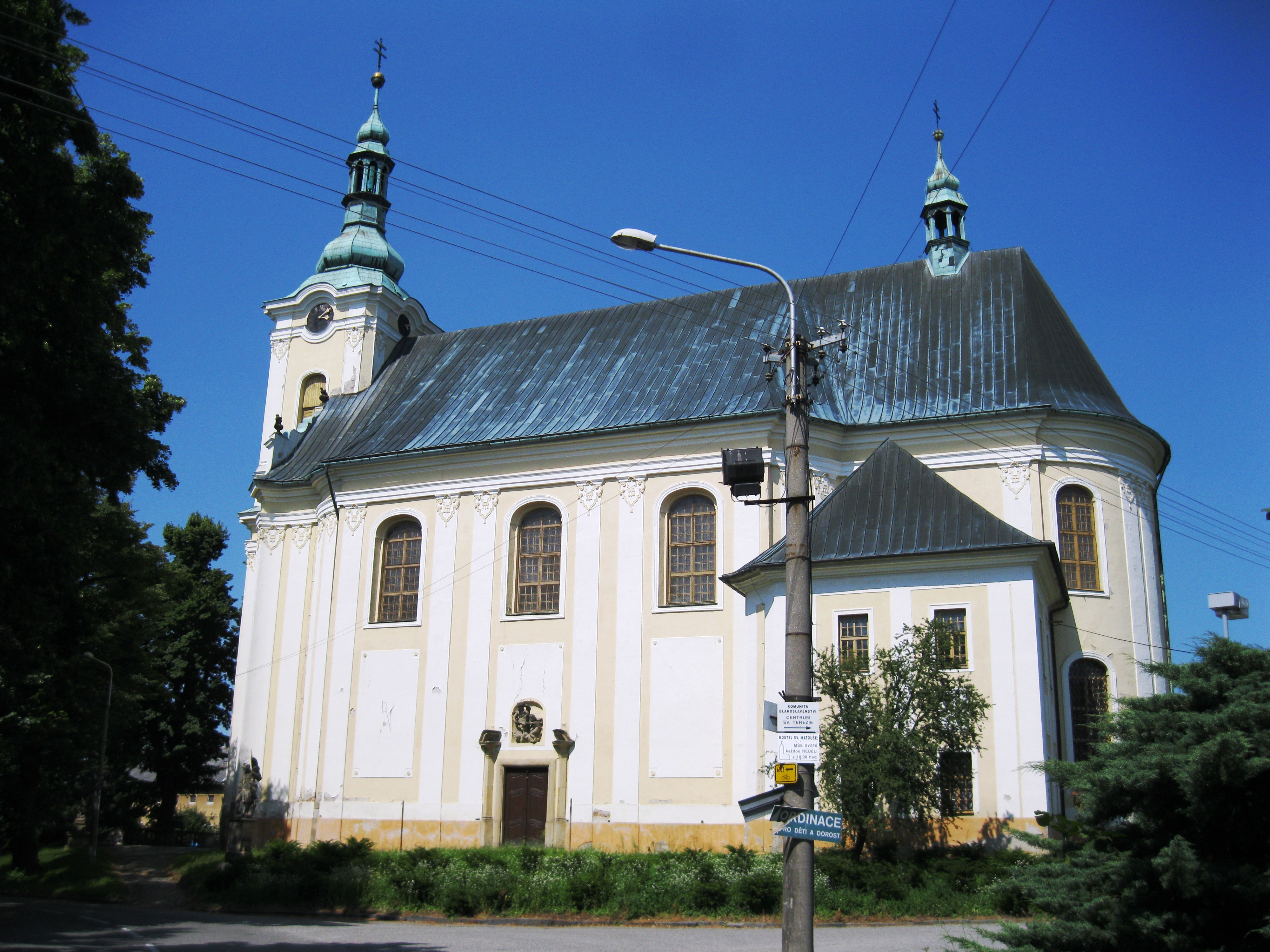 Kostel sv. Matouše (Dolany), Dolany